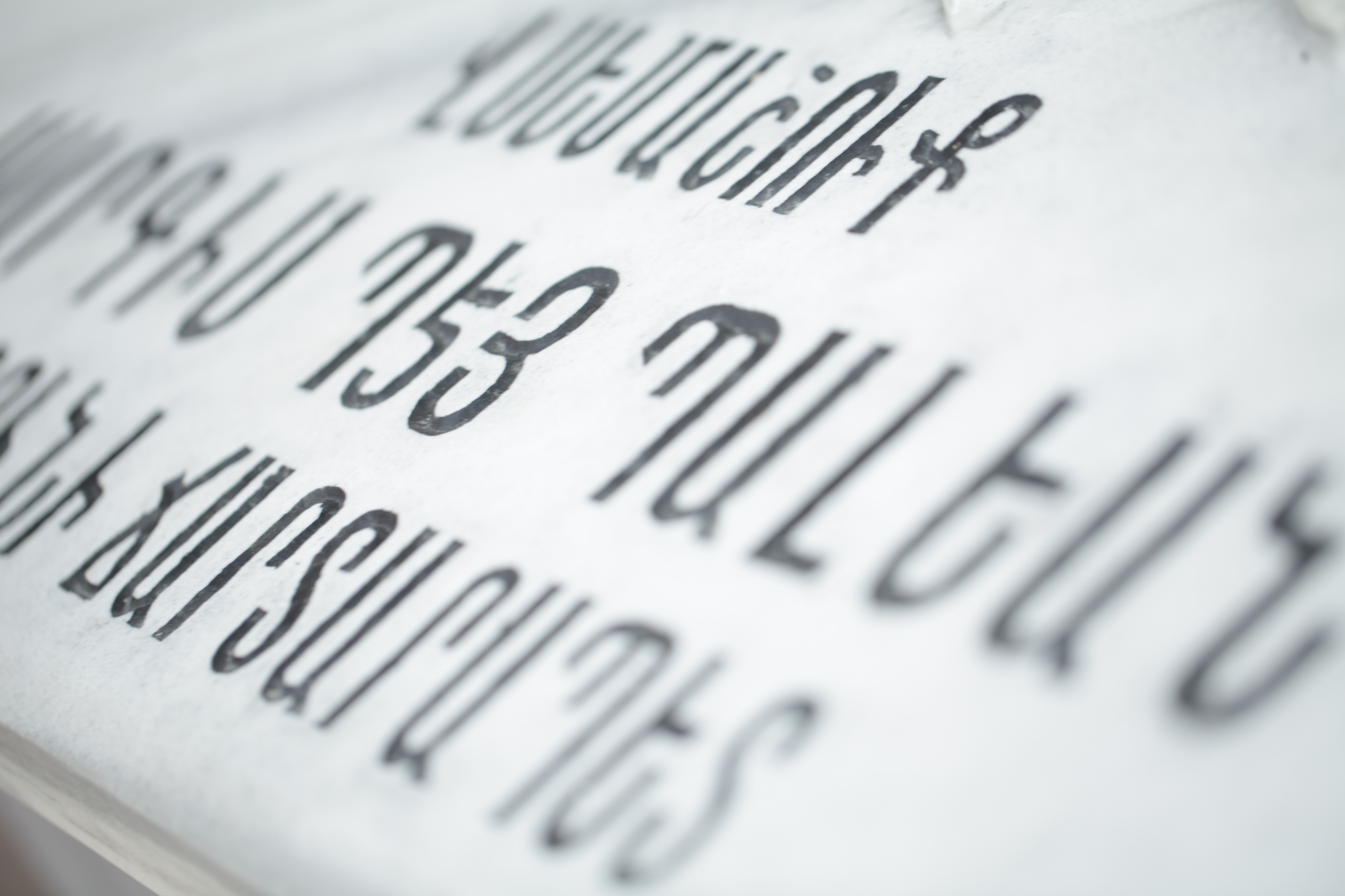 Sarkis Bey Balyan'a ait lahit